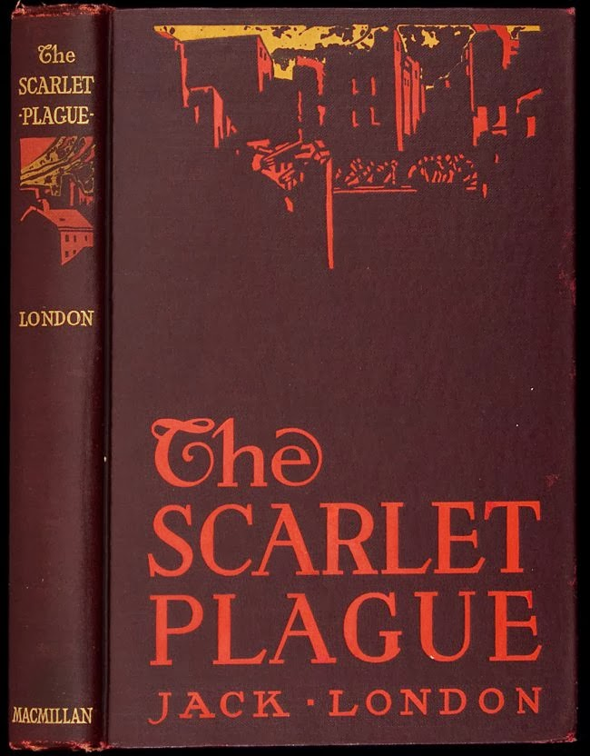 Couverture de la première édition originale